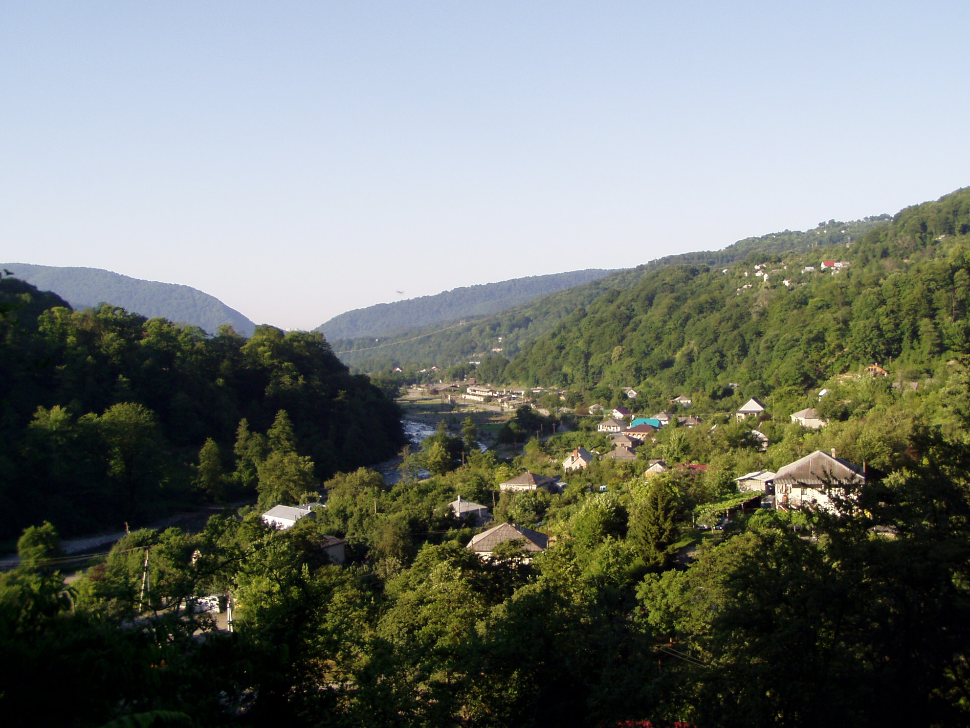 Село Верхняя Пластунка